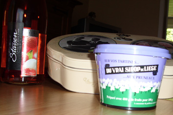 Sirop de Liège en Stassen - Aubel - provincie Luik - België